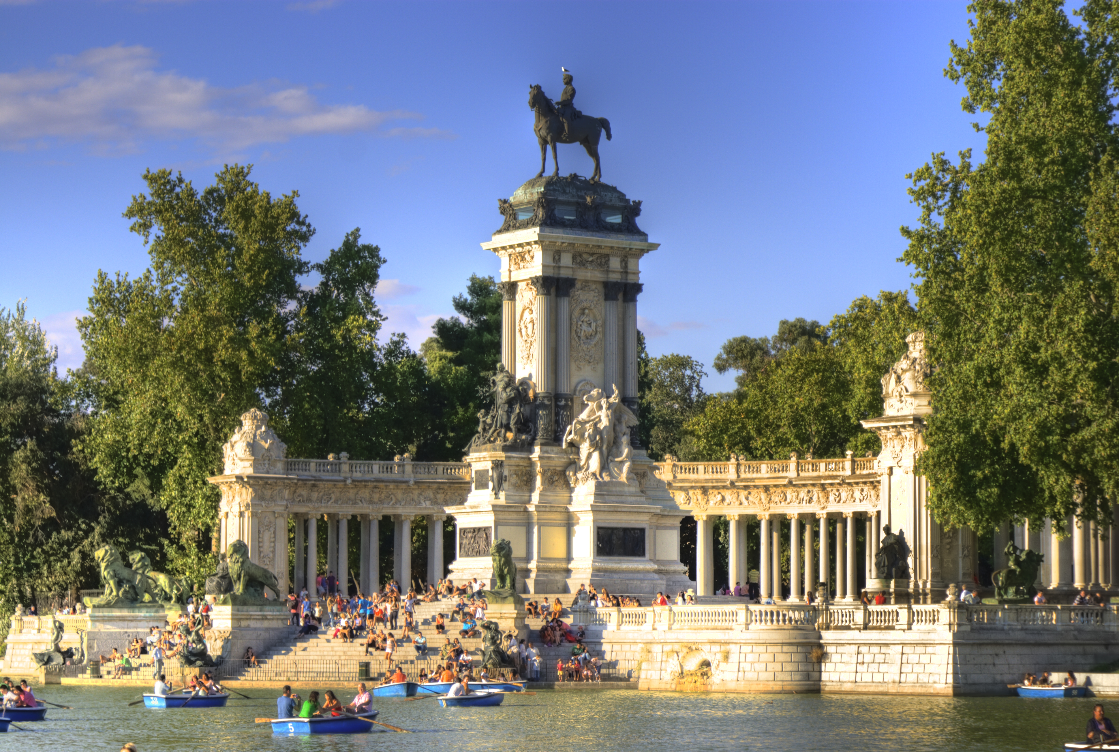 Monumento del Retiro, con el lago y las barcas